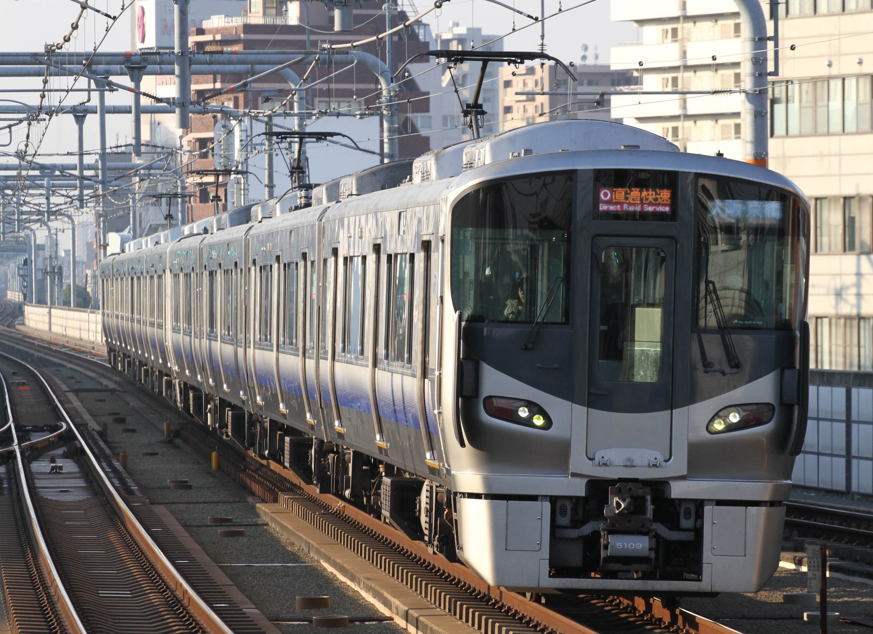 阪和線 直通快速 鶴ヶ丘駅にて